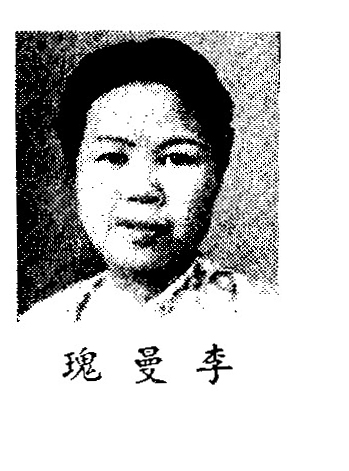 中文（中国大陆）: 制憲國民大會代表